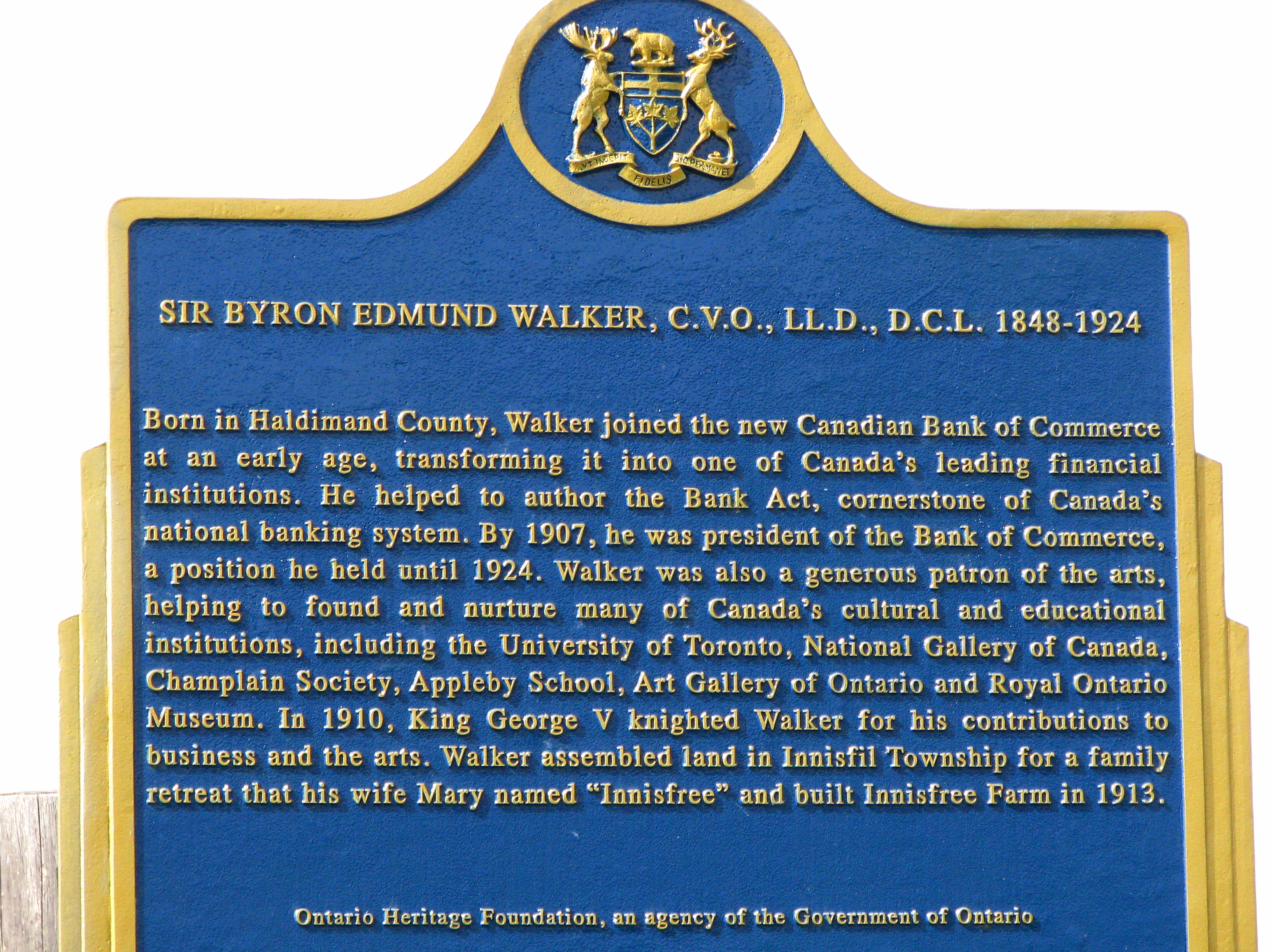 Sir Byron Edmund Walker